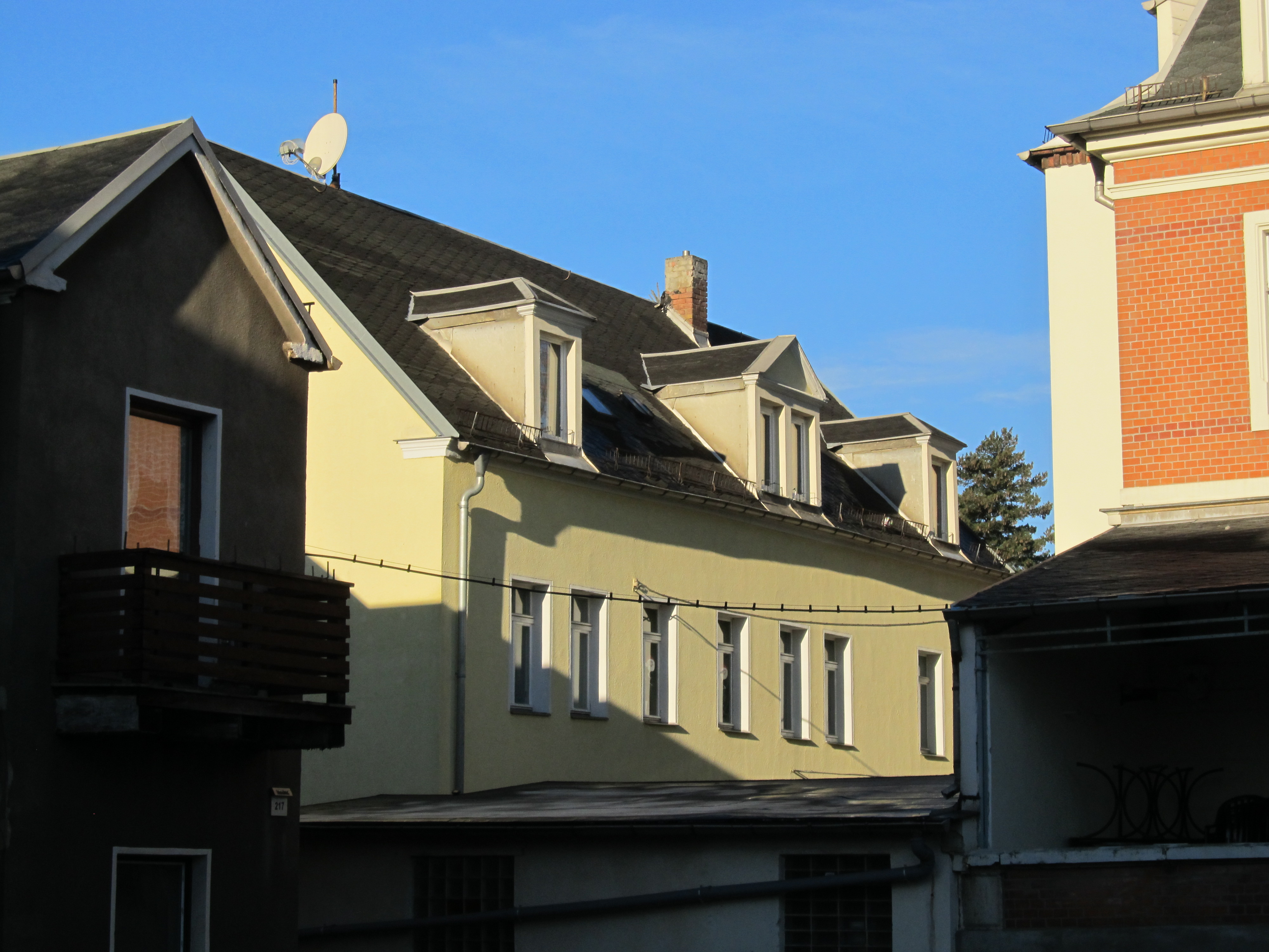 Hinterhaus des Gasthofs Wilder Mann, Großenhainer Str. 219, Dresden. In der Zeit der Weimarer Republik langjähriges Wohnhaus des späteren Leichtathleten Rudolf Harbig.